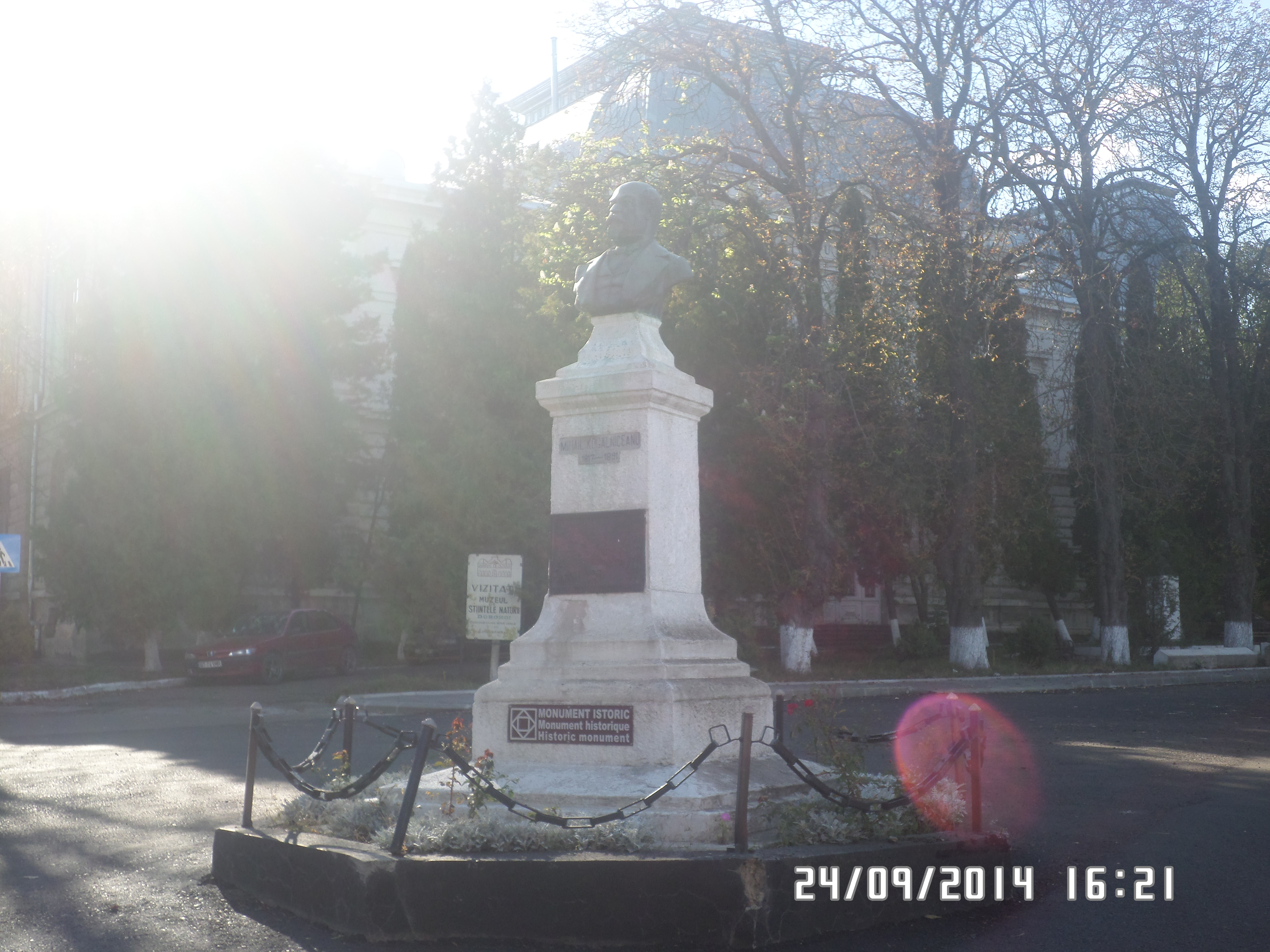 Constructie realizata in anul 1913 de catre sculptorul Wladimir Hegel, amplasata pe str. Al.I. Cuza din Dorohoi